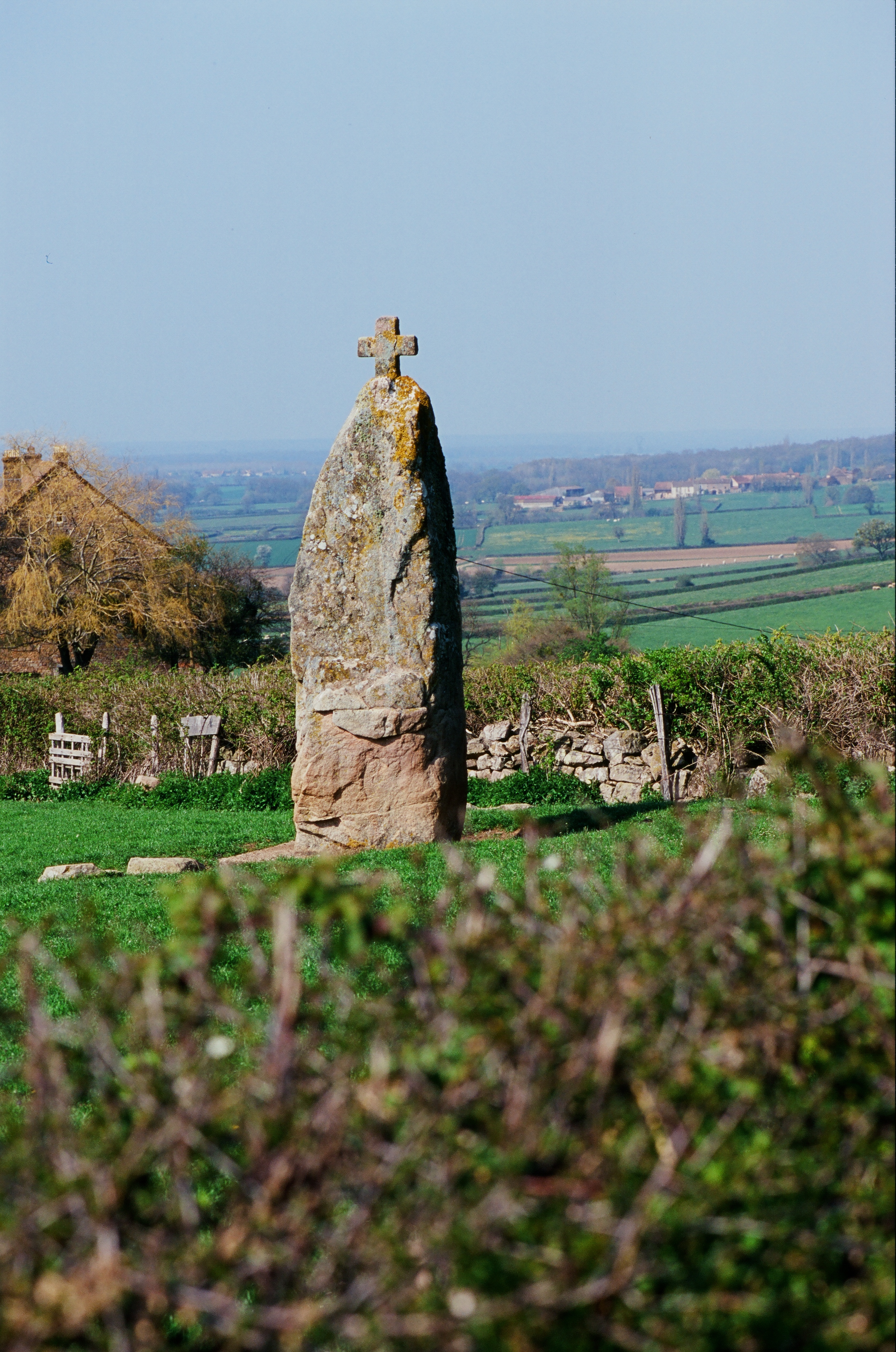 Pierre Levée du champ de la Fa, Embouche-de-Pierre-Levée (Classé, 1911) .